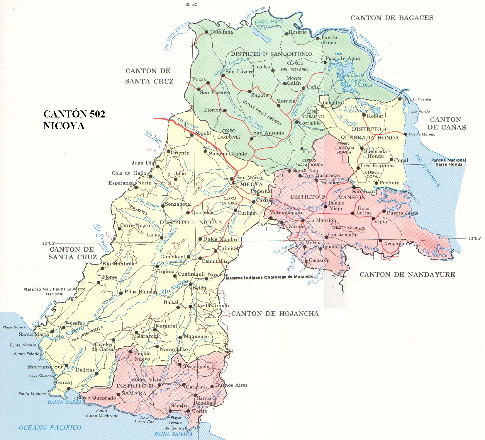 Cantón de Nicoya